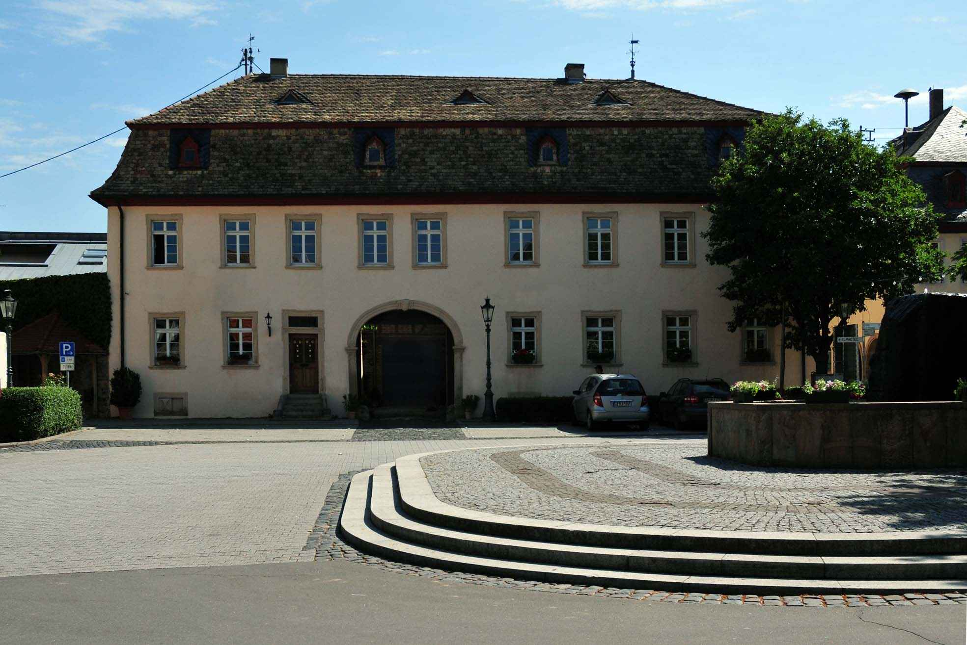 Haus Hinkel, ehem. Posthaltestationen in Flonheim